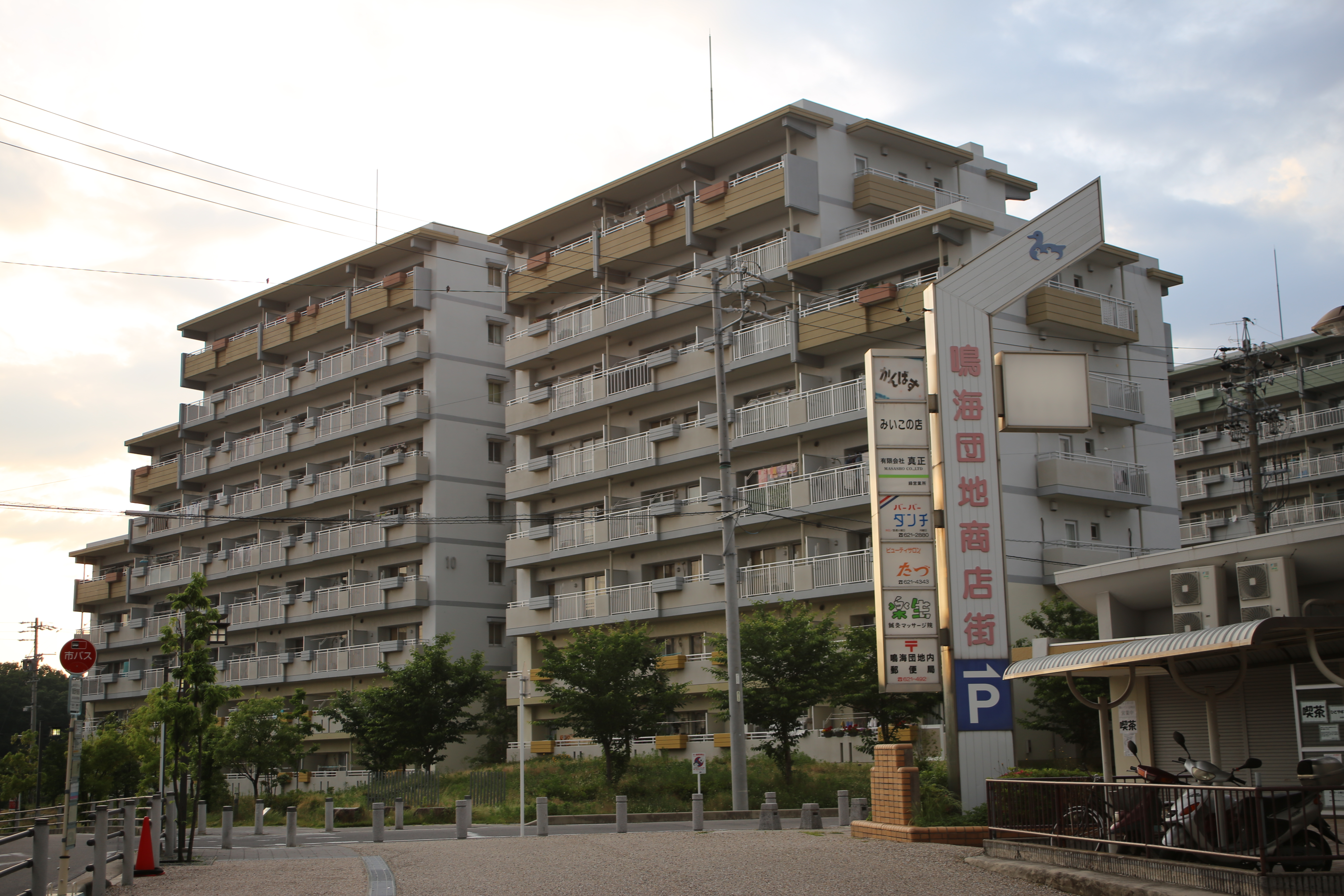 愛知県名古屋市緑区鳴海町の鳴海団地